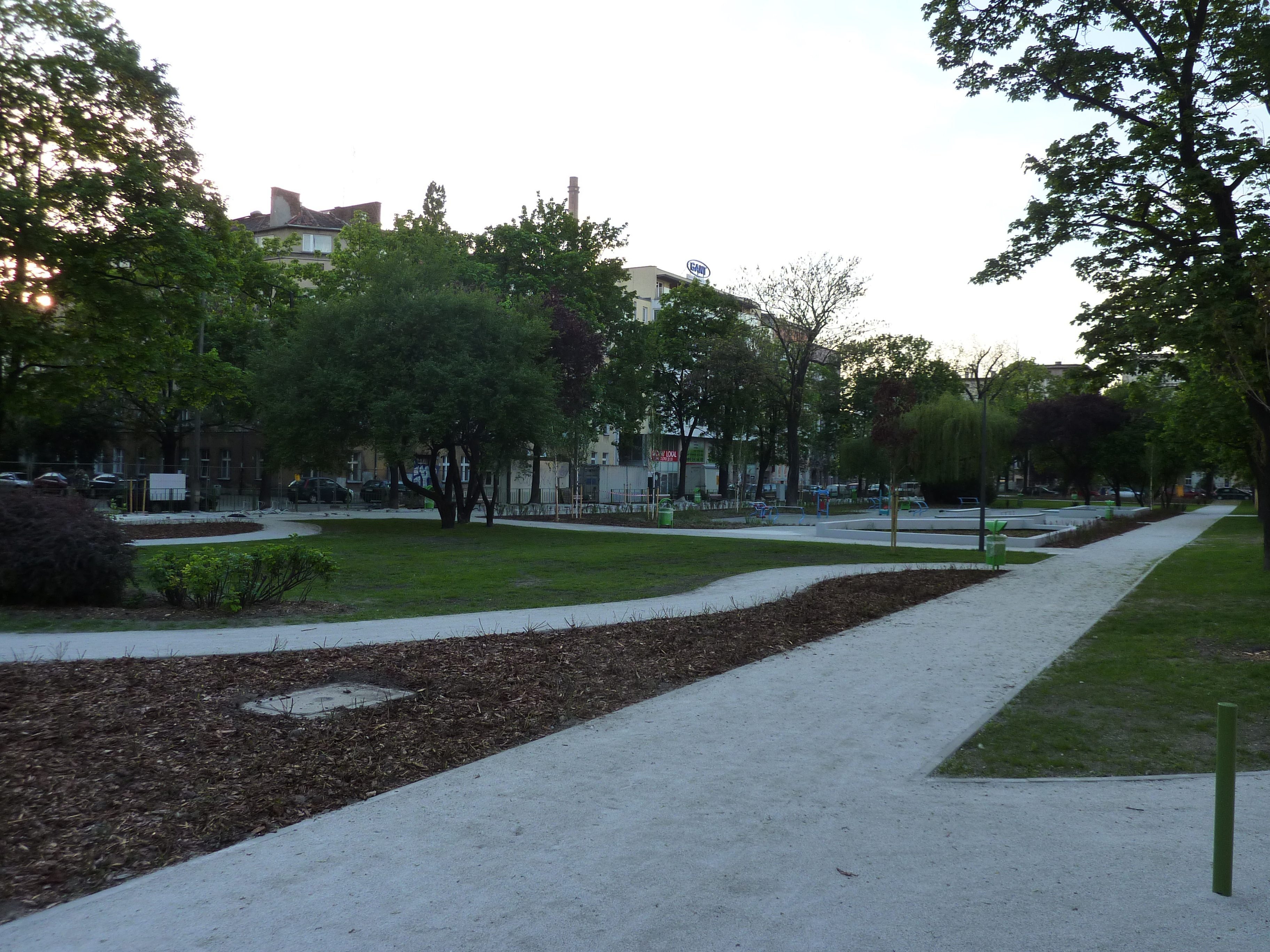 Skwer przy ul. Pomorskiej we Wrocławiu, pierwszy wrocławski park miejski, założony w 1816 r.